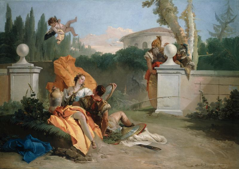 Rinaldo and Armidalabel QS:Len,"Rinaldo and Armida"label QS:Lit,"Armida e Rinaldo nel giardino"